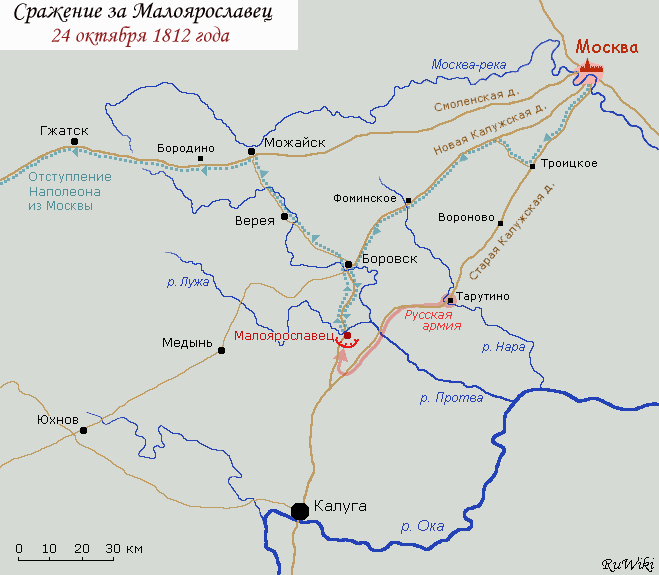 Бітва за Малаяраславец, 1812.